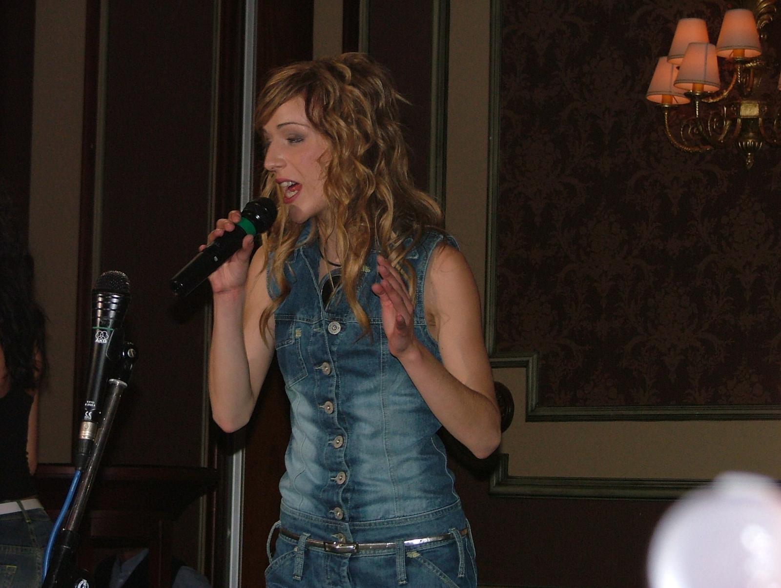 Marta Roure cantant "Jugarem a estimar-nos" (Andorra)